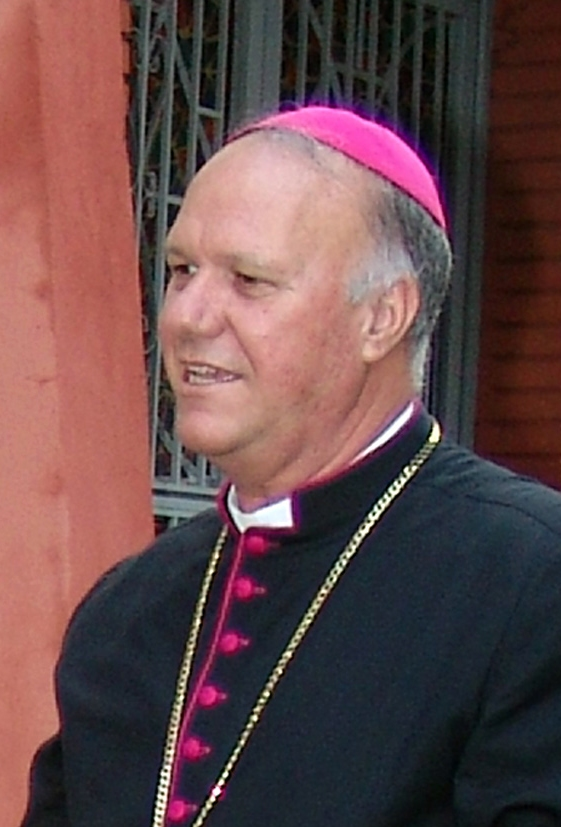 Mauro Aparecido dos Santos, Dom, sacerdote católico brasileiro, arcebispo de Cascavel.